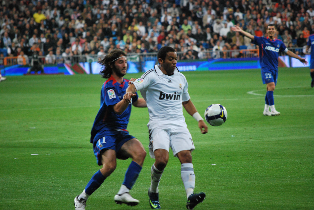 Real Madrid - Getafe